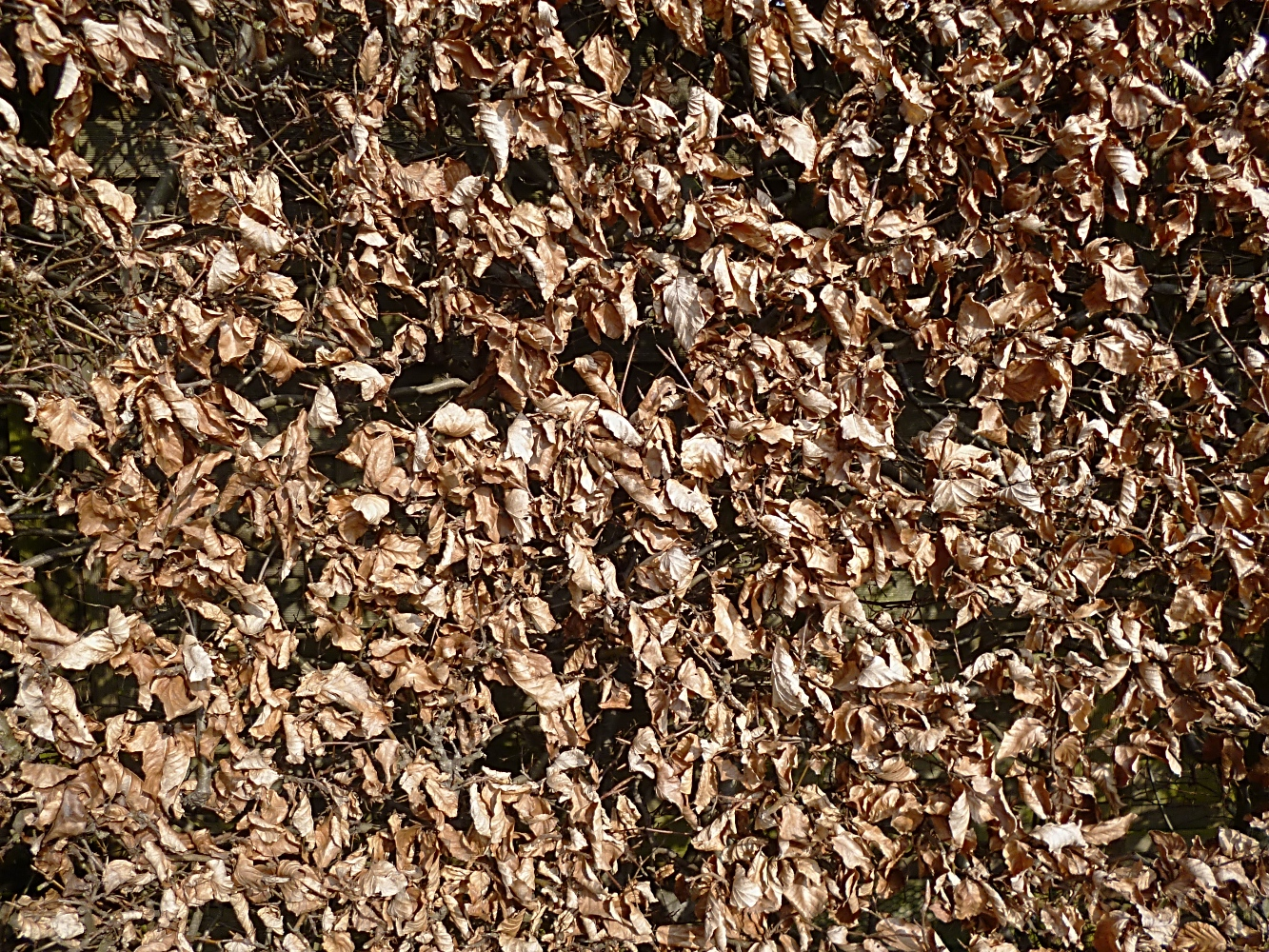 Rotbuchenhecke mit Vorjahreslaub, immer noch guter Schutz